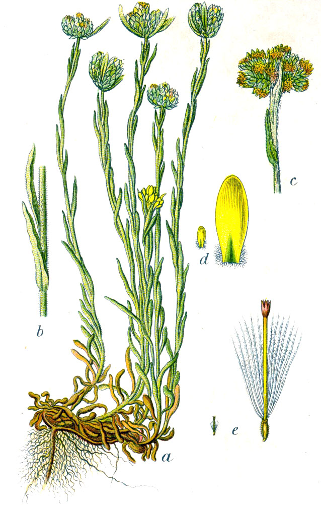 Helichrysum luteoalbum (L.) Rchb., syn. Gnaphalium luteolum E.H.L.Krause (= Pseudognaphalium luteoalbum, Laphangium luteoalbum, Gnaphalium luteoalbum) Original Caption Gelbliches Ruhrkraut, Gnaphalium luteolum